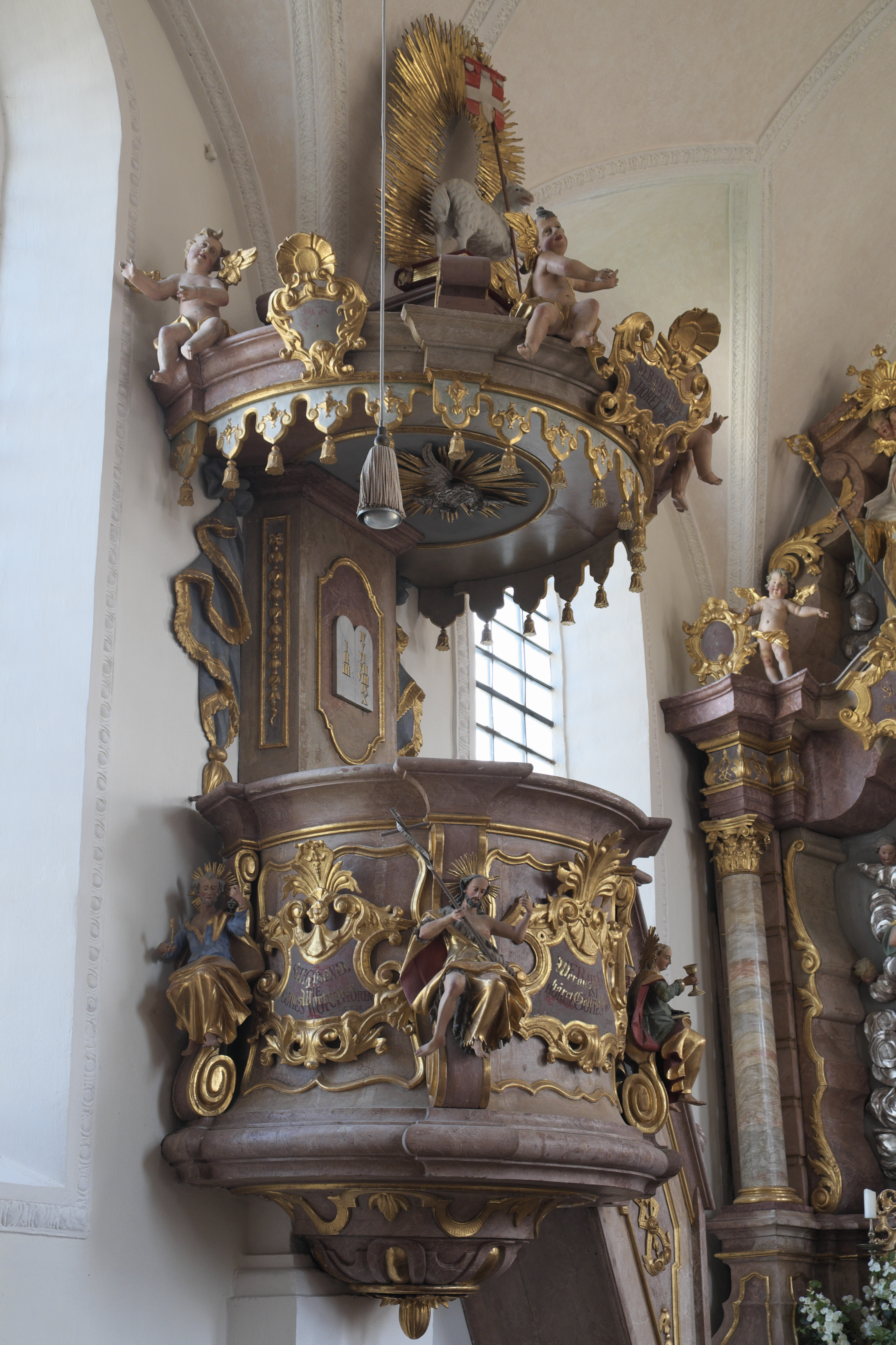 Katholische Filialkirche St. Vitus in Grucking (Fraunberg) im Landkreis Erding (Bayern/Deutschland), Frührokokokanzel